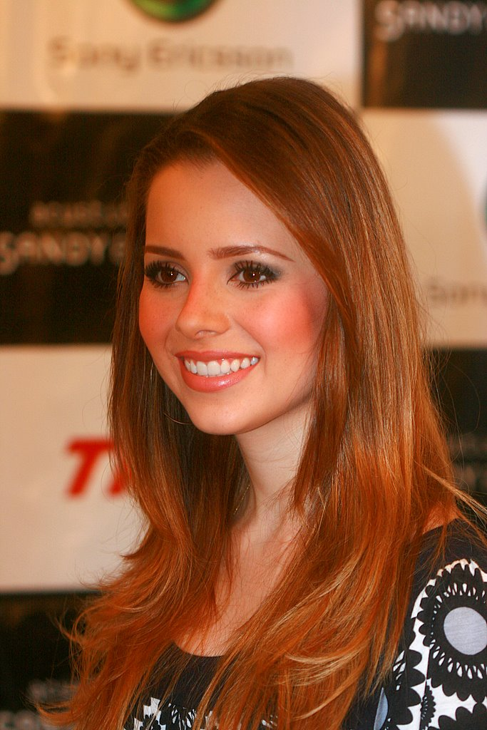 Sandy durante a “Turnê Acústico MTV Sandy e Junior: a última”, da banda "Sandy e Junior. Em Curitiba 9 de Novembro de 2007.